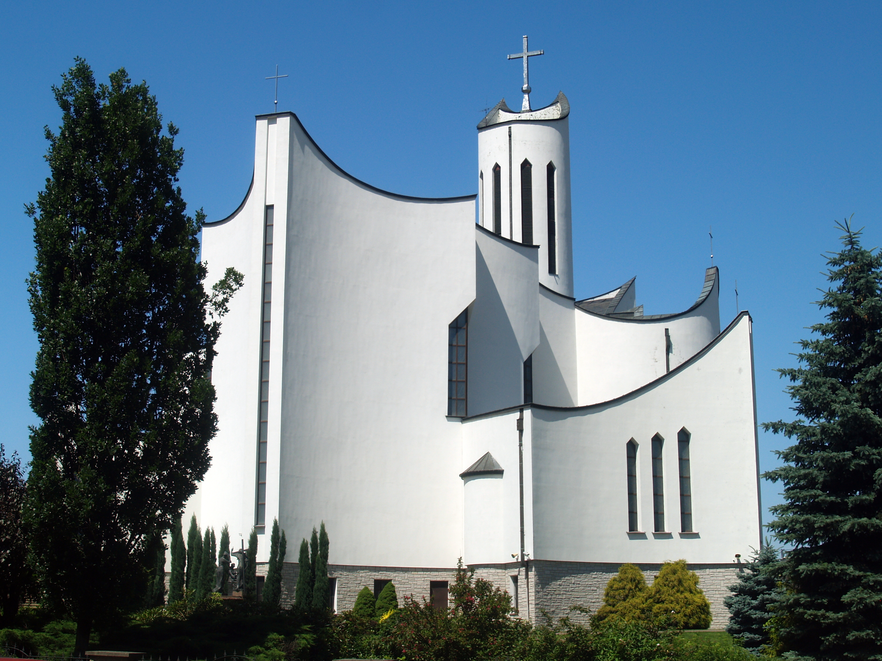 Kościół Ducha Świętego w Dębicy